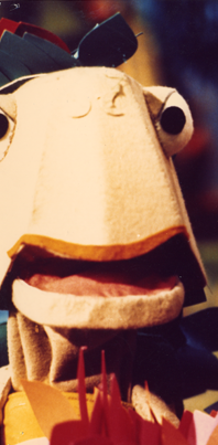 Stoffel de Schildpad uit de Fabeltjeskrant